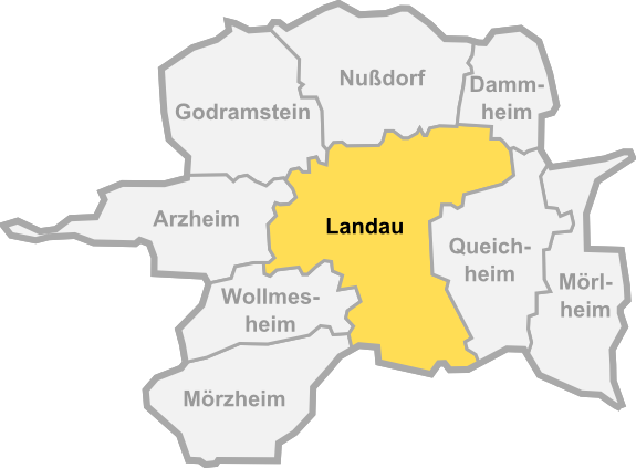 Landau OT Landau